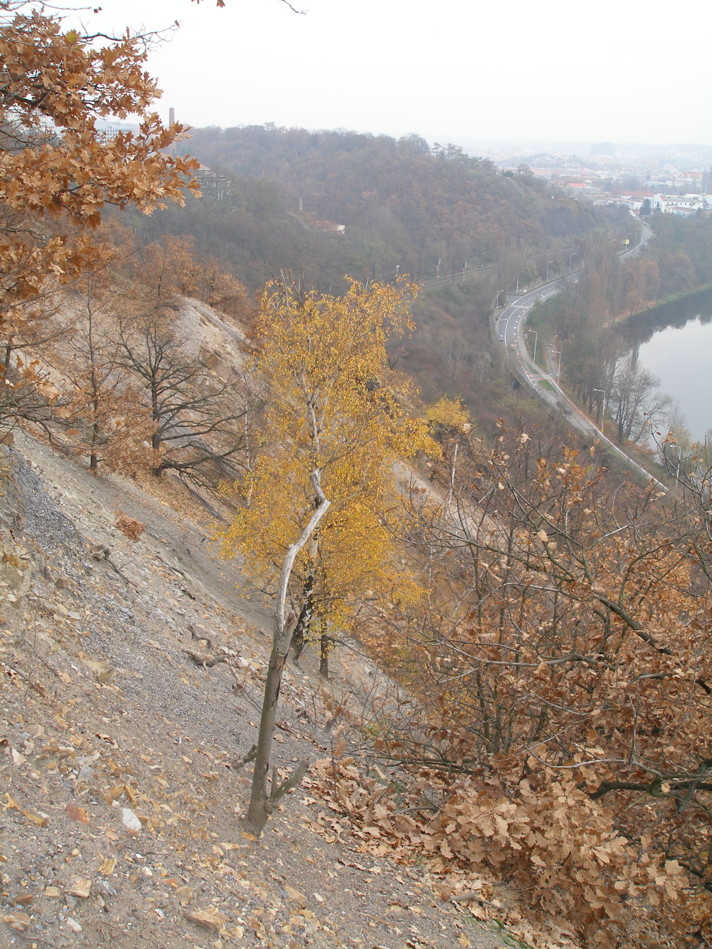 Skaliska Bílé skály v Praze.